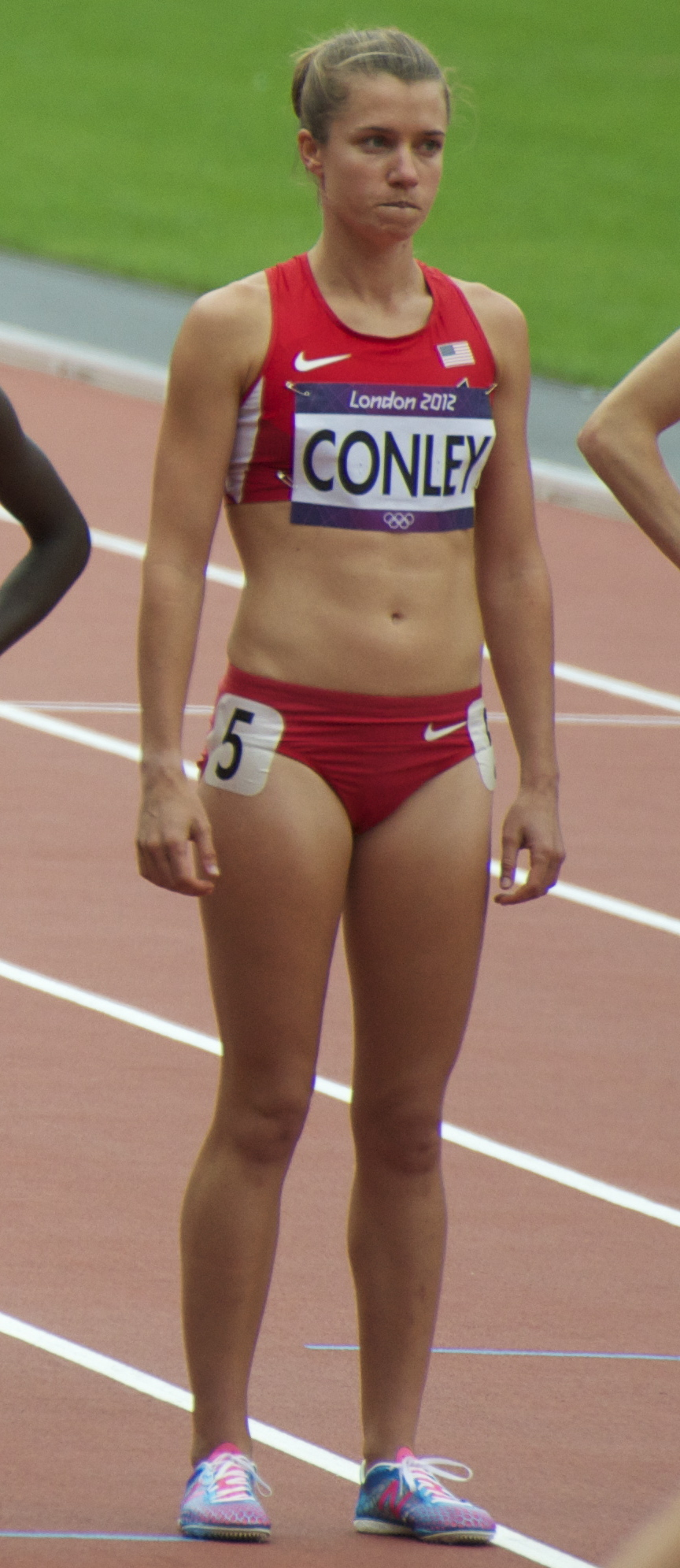 Women's 5000m